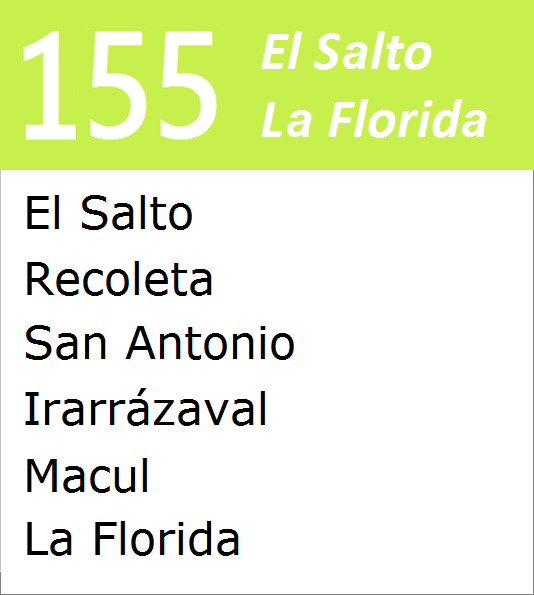 Letrero